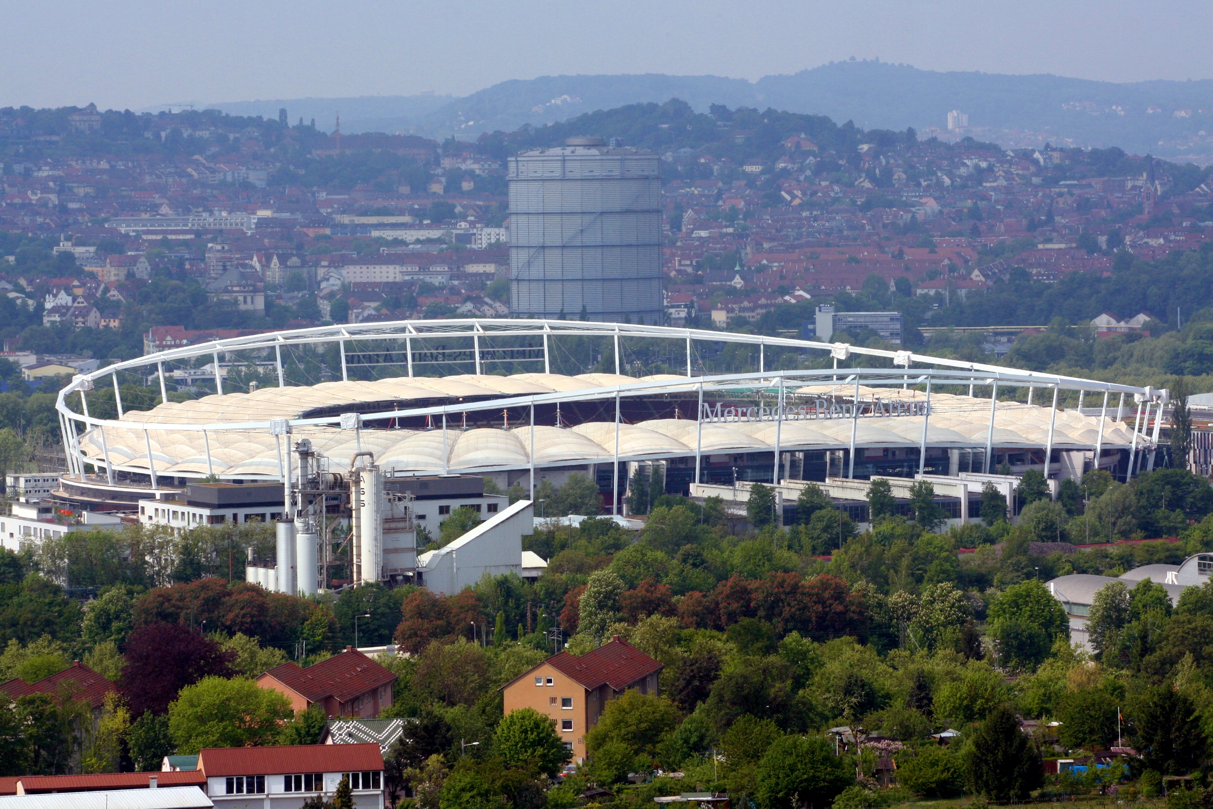 Mercedes-Benz-Arena in Stuttgart-Bad Cannstatt, Baden-Württemberg